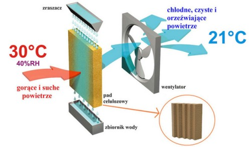 Suche powietrze przepływając przez nasączone wodą złoże ociekowe, odparowuje wodę. Odparowanie wody powoduje spadek temperatury powietrza. Przepływ powietrza wymuszony jest wentylatorem.